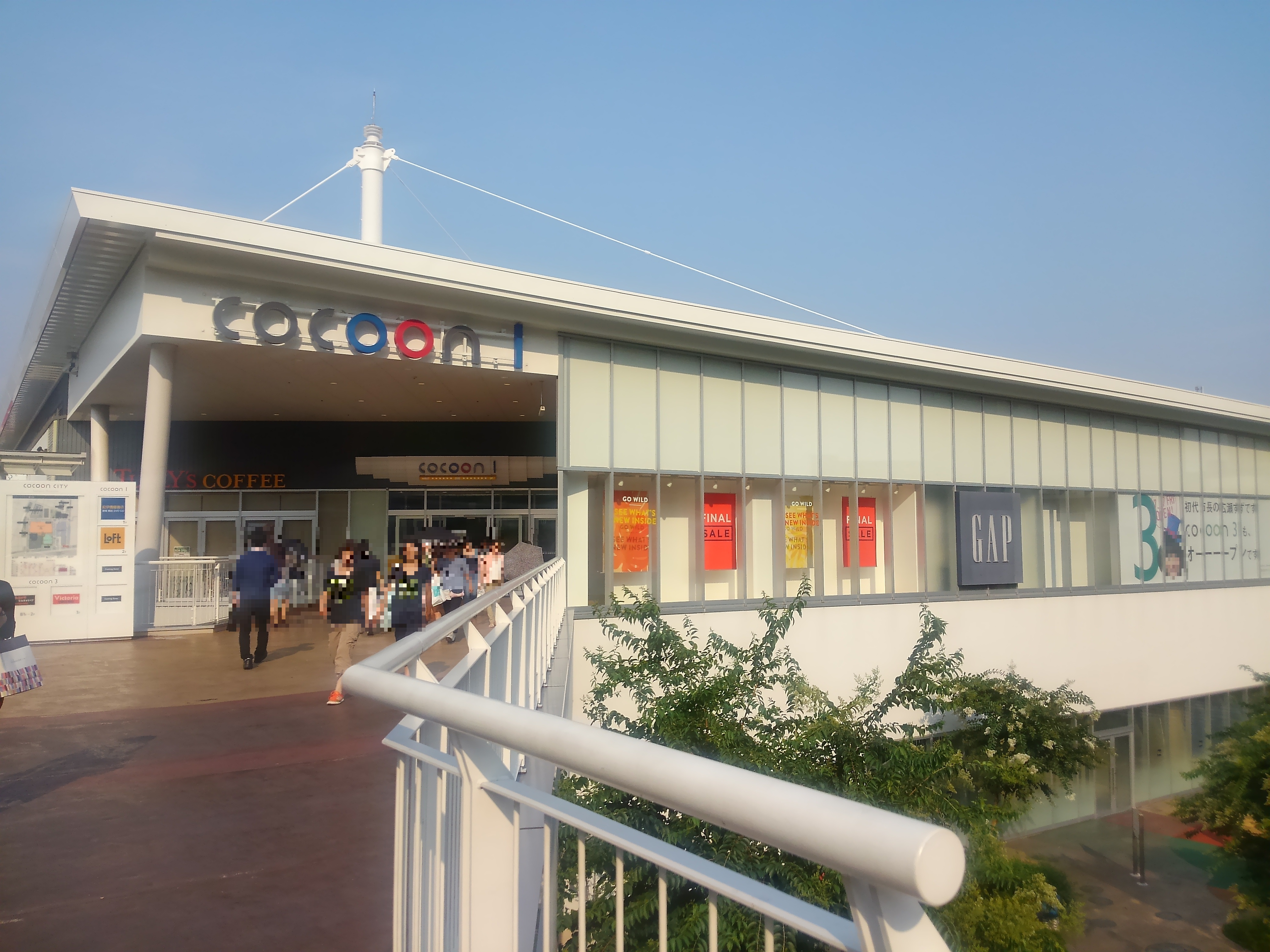 さいたま新都心の「コクーンシティ」、コクーン1正面入口。埼玉県さいたま市大宮区吉敷町。